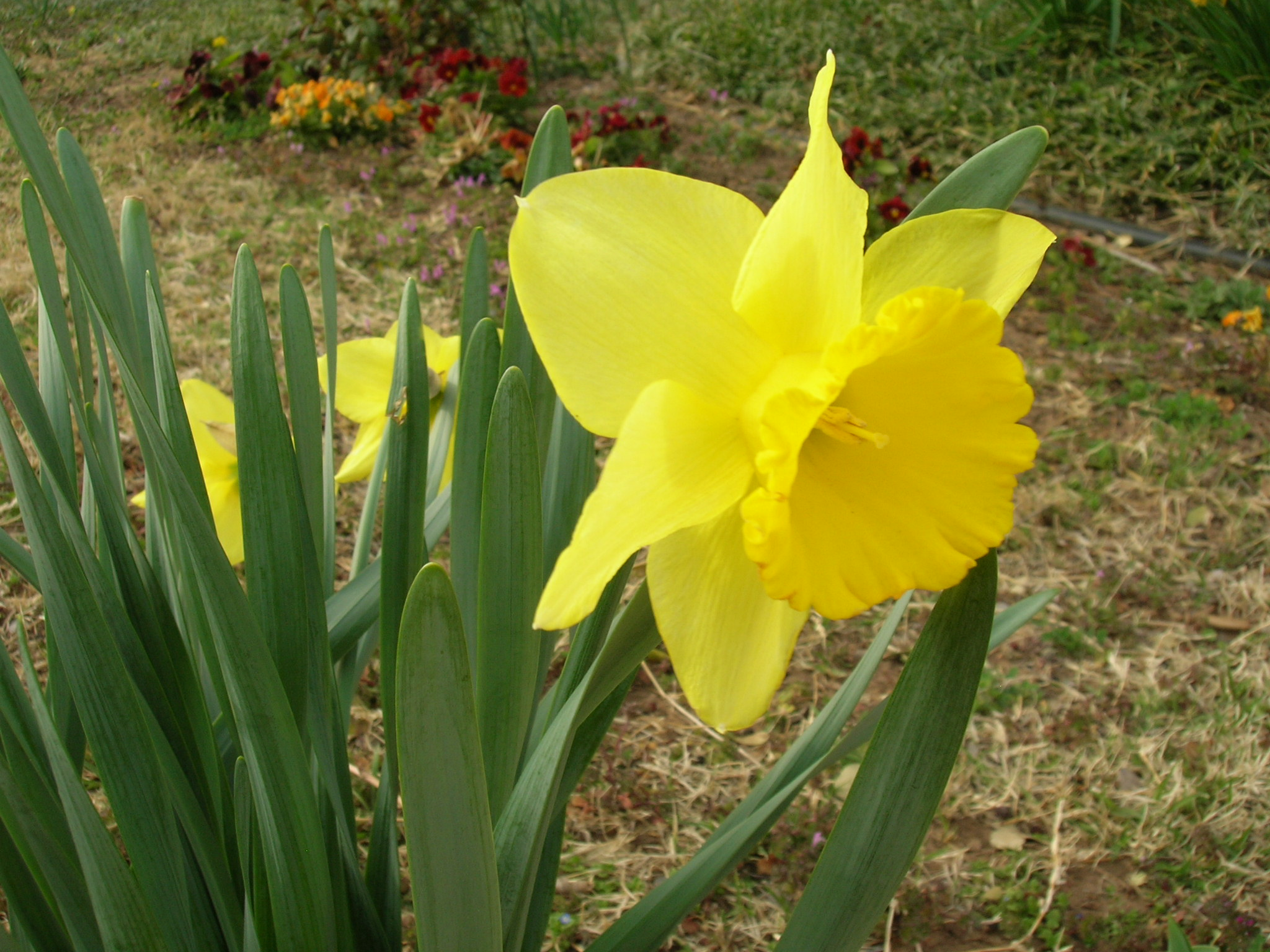 Narcissus blooming in Oklahoma.